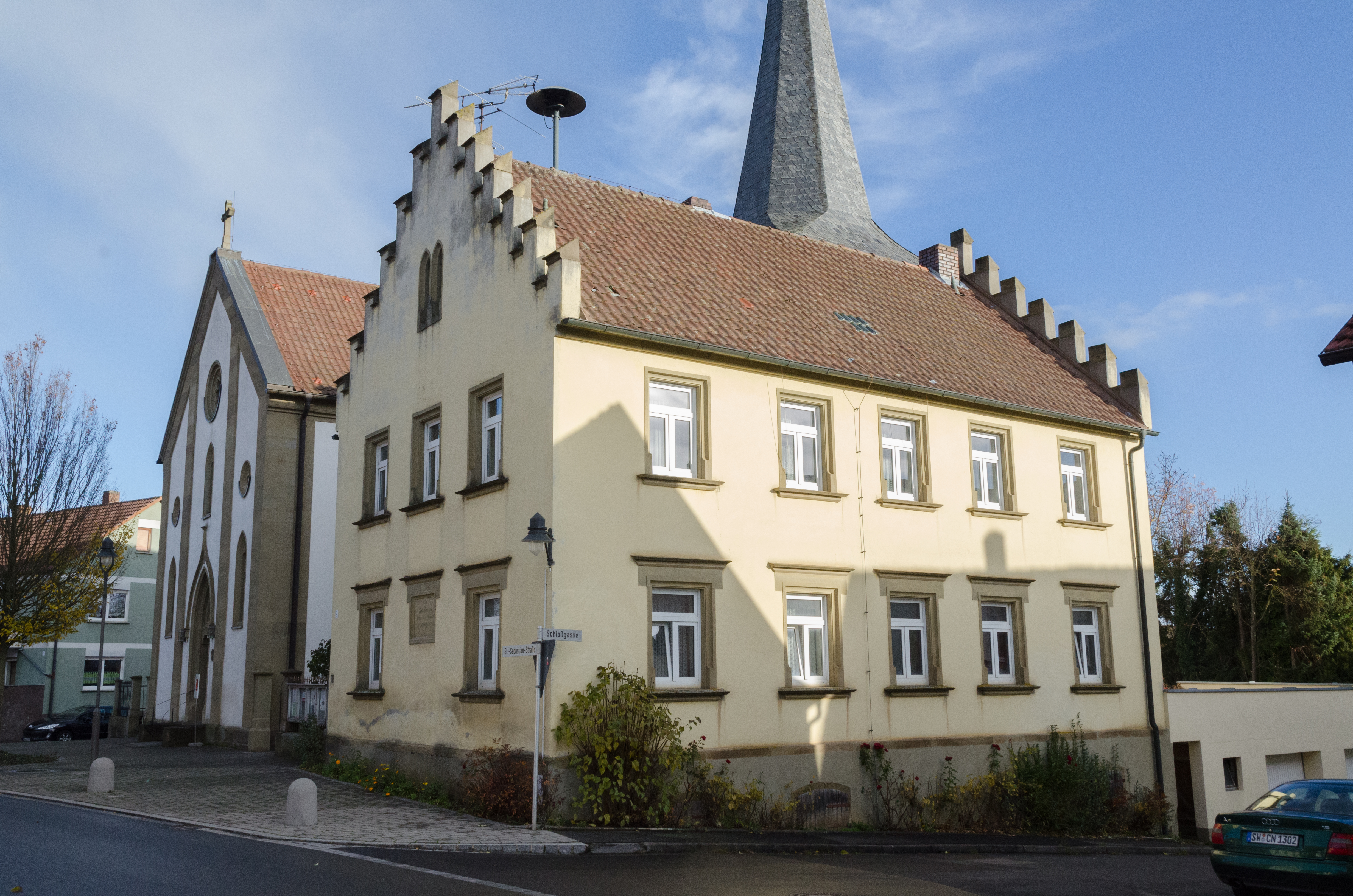 Kronungen, Altes Schulhaus